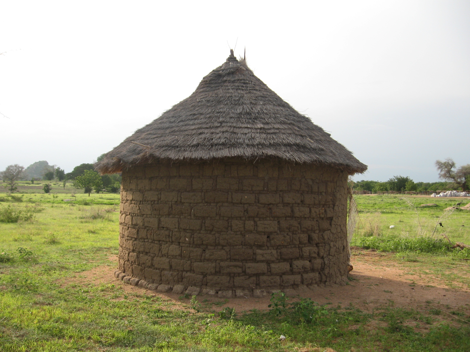 Photo d'une case comme on peut en trouver dans l'extrême nord du Cameroun.